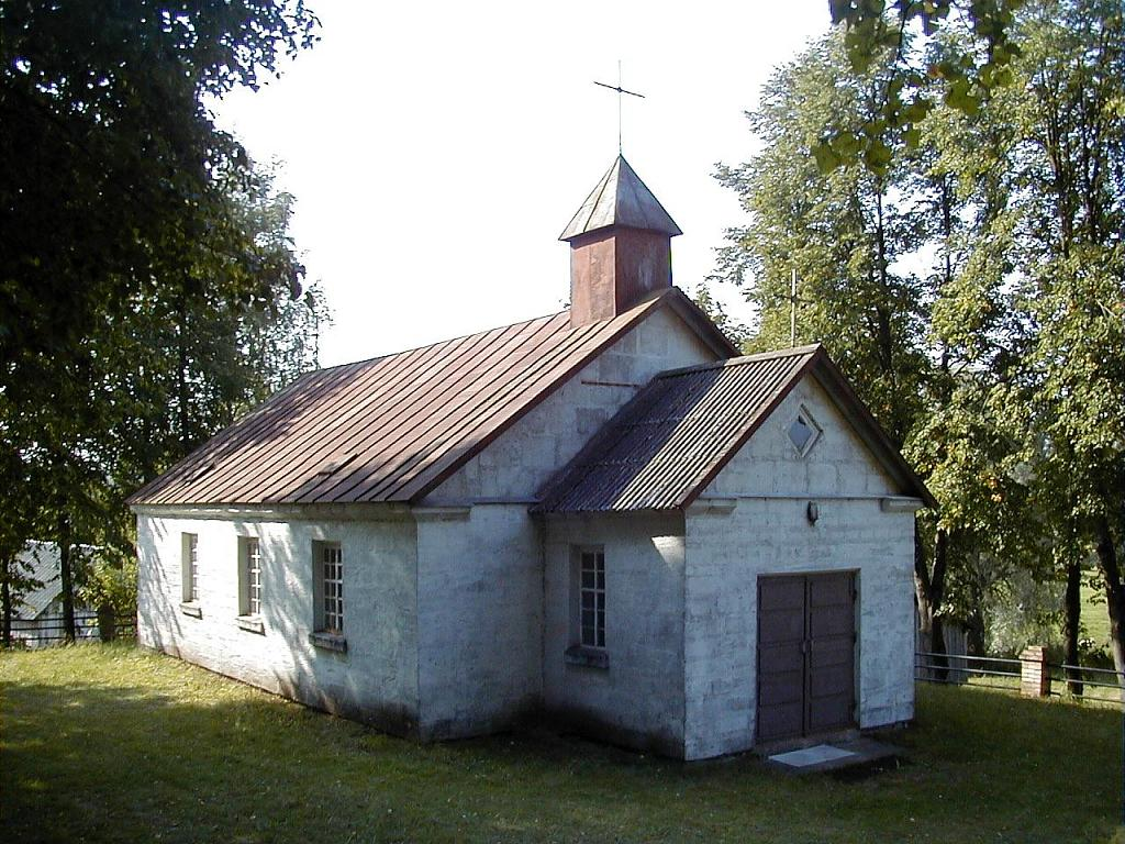 Raģeļu baznīca 2002-08-11